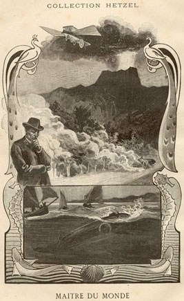 Ilustrace Georga Rouxe k románu J. Verna